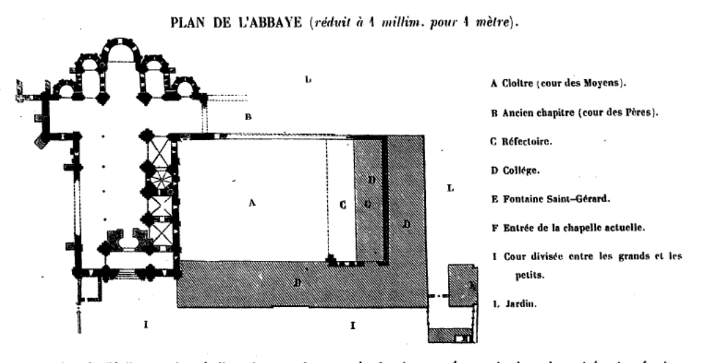 Plan de l'abbay de la Sauve-Majeure